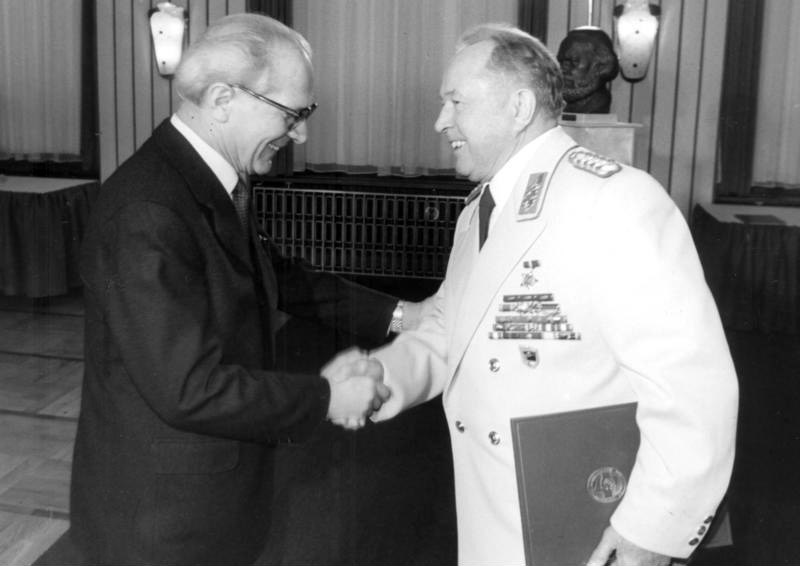 30 Jahre MfS, Erich Honecker, Erich Mielke Erich Honecker beglückwünscht Erich Mielke zum 30. Jahrestag der Bildung des Ministeriums für Staatssicherheit Abgebildete Personen: Honecker, Erich: Staatsratsvorsitzender, Generalsekretär des ZK der SED, DDR (GND 118553399) Mielke, Erich: Minister für Staatssicherheit, Armeegeneral, Politbüro des Zentralkomitees (ZK) der SED, DDR (GND 118977490)